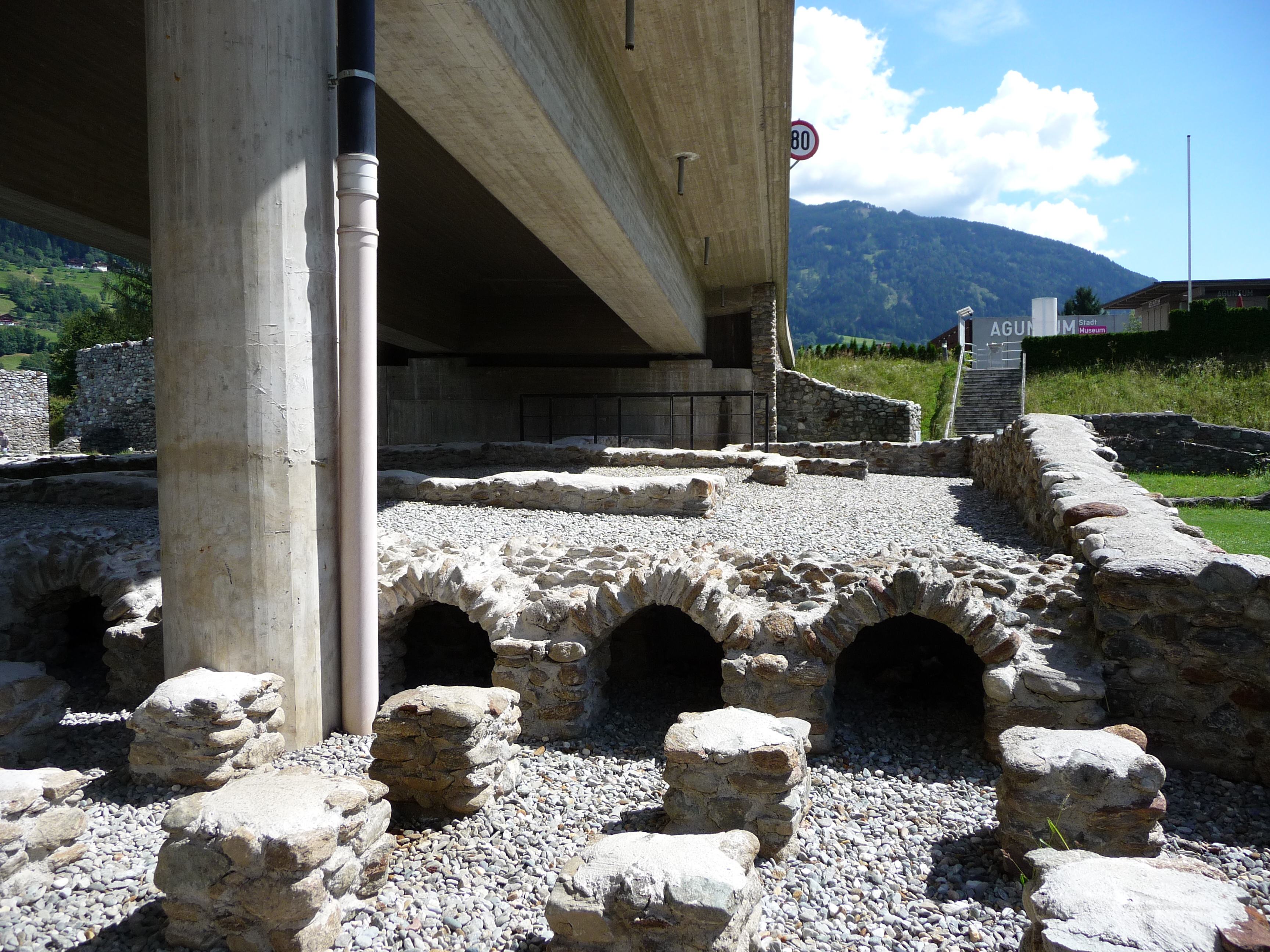 Ausgrabung in Aguntum unter der Bundesstraße